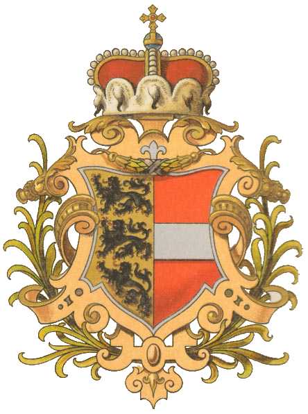 Wappen des Herzogtums Kärnten